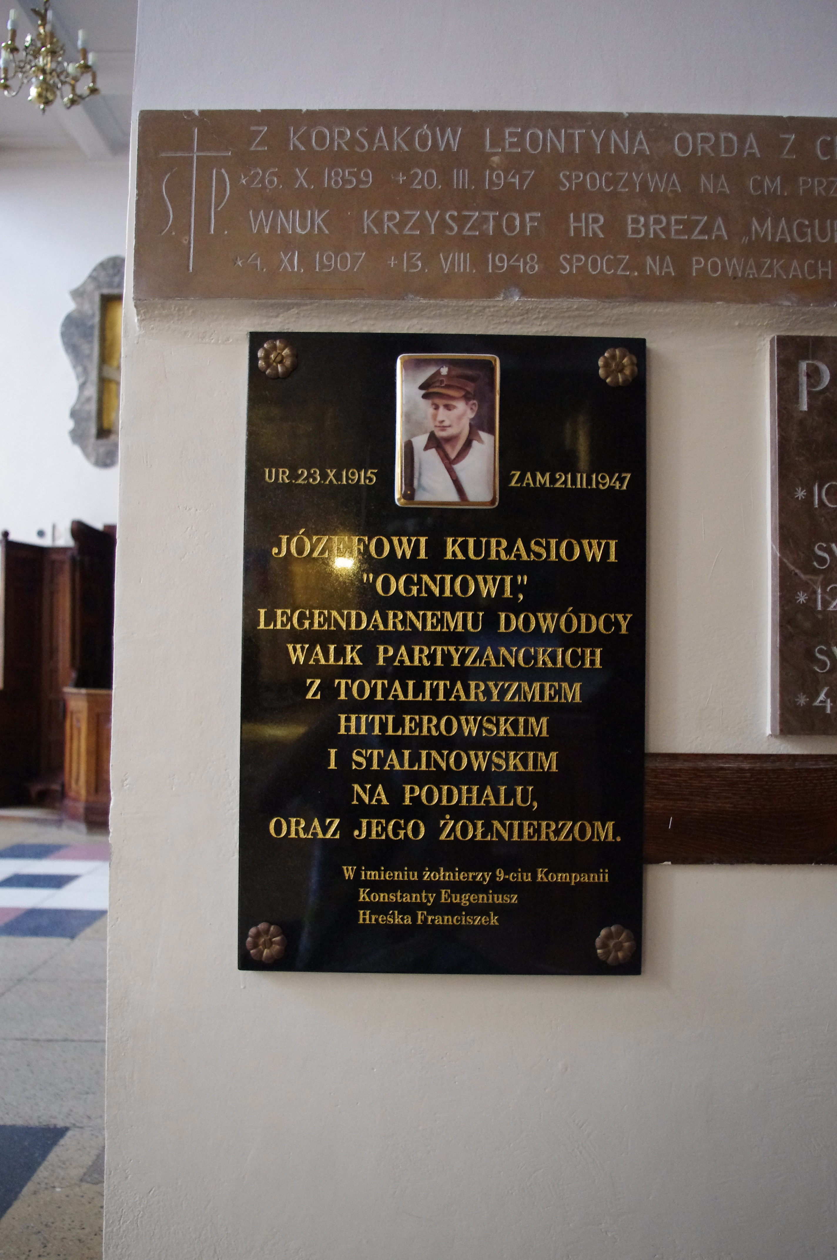 Tablica upamiętniająca Józefa Kurasia w Kościele św. Stanisława Kostki w Warszawie